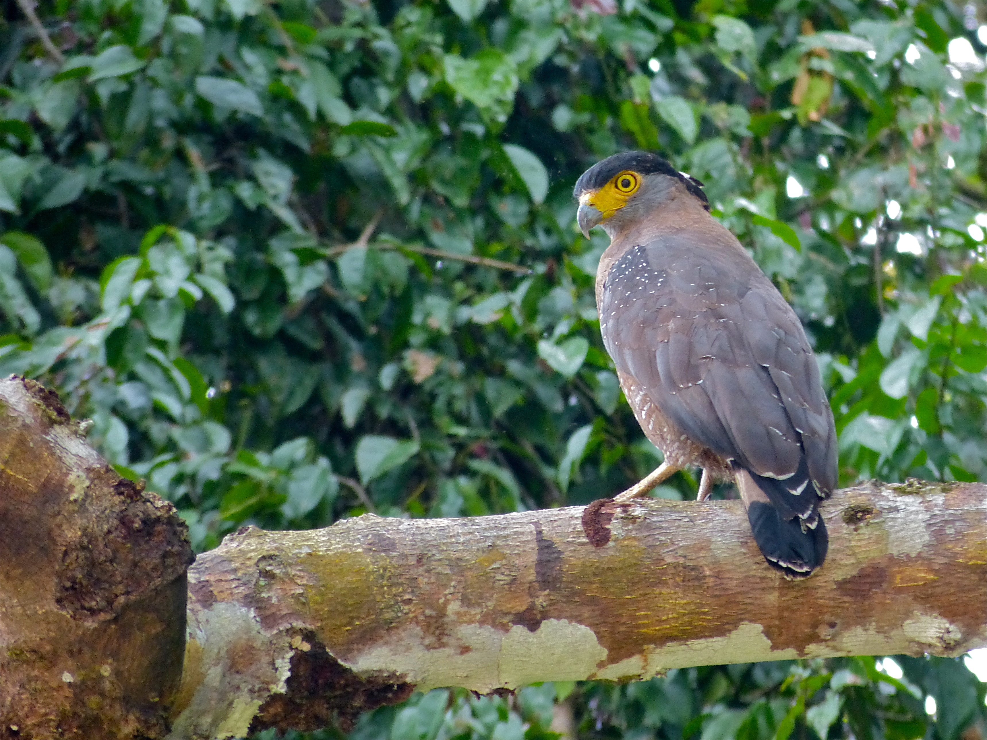 Kinabatangan River, Sukau, Sabah, MALAYSIA